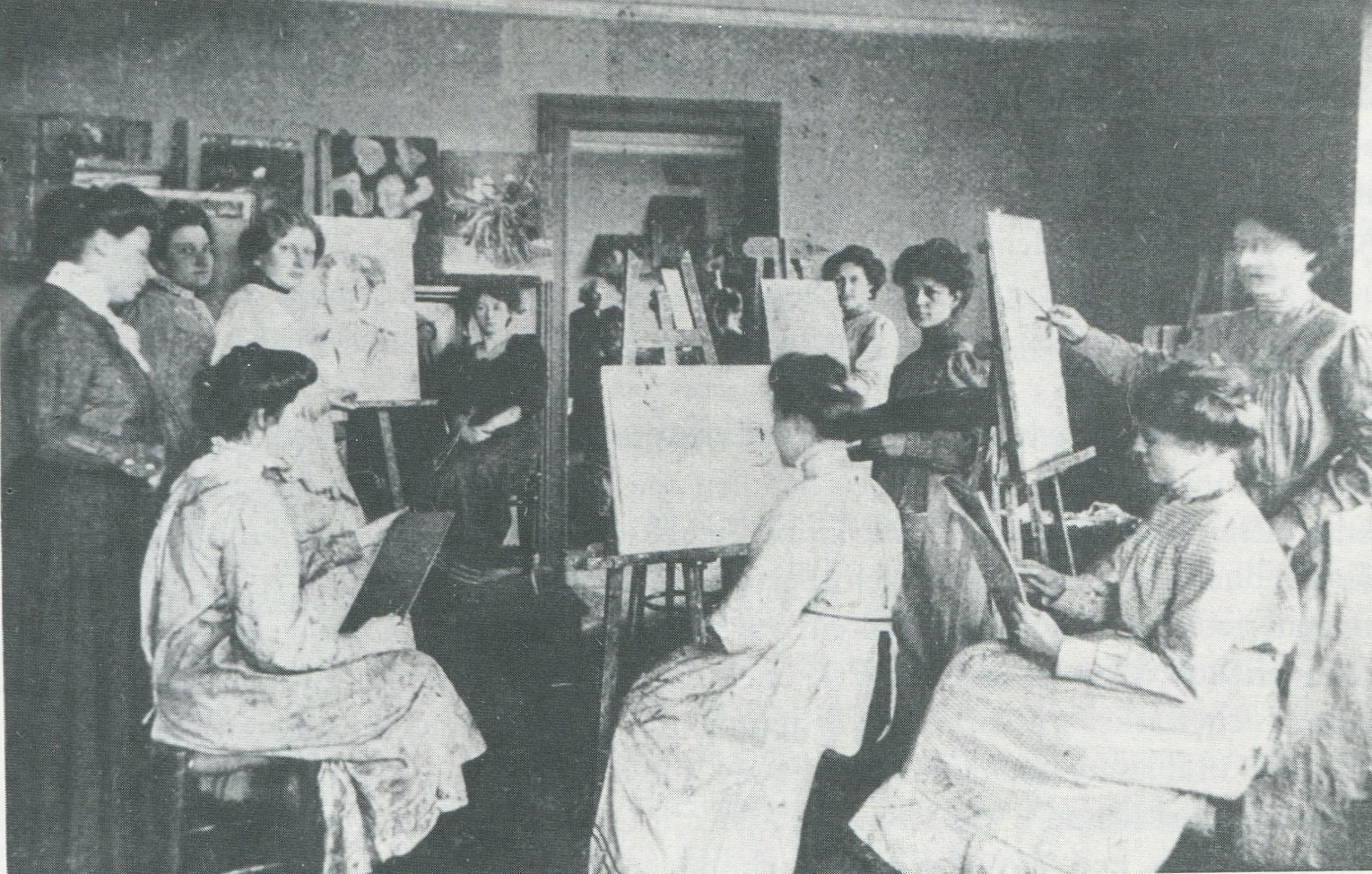 Malschule Gerda Koppel circa 1911